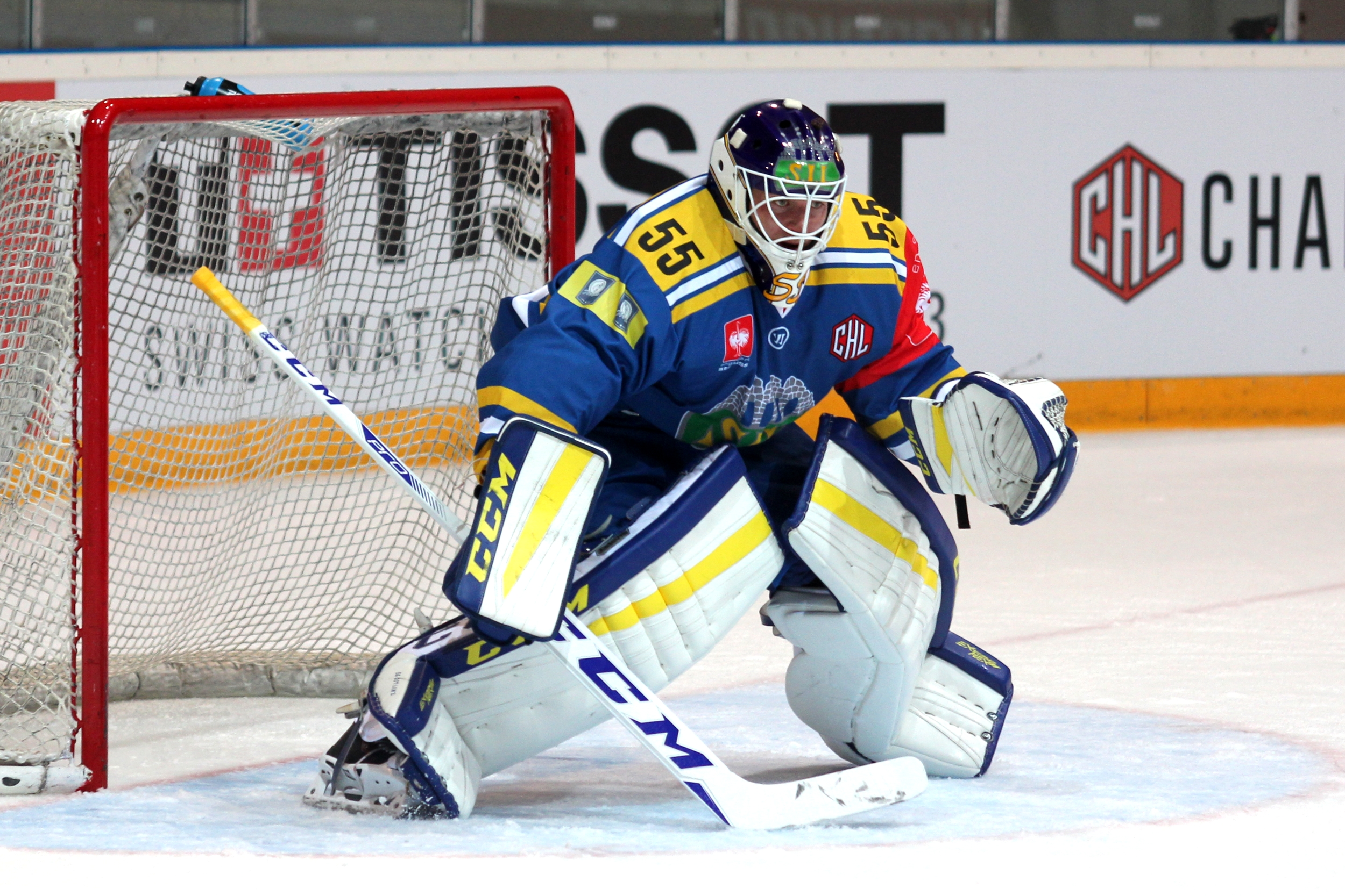 Oskar Östlund (H 55).